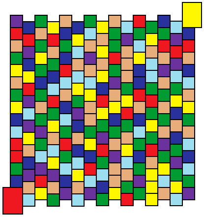 Filler Spielbrett. Quadratische Felder mit versetzter Anordnung, simuliert sechseckige Felder